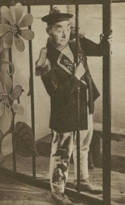 Václav Trégl (1902-1979), český herec